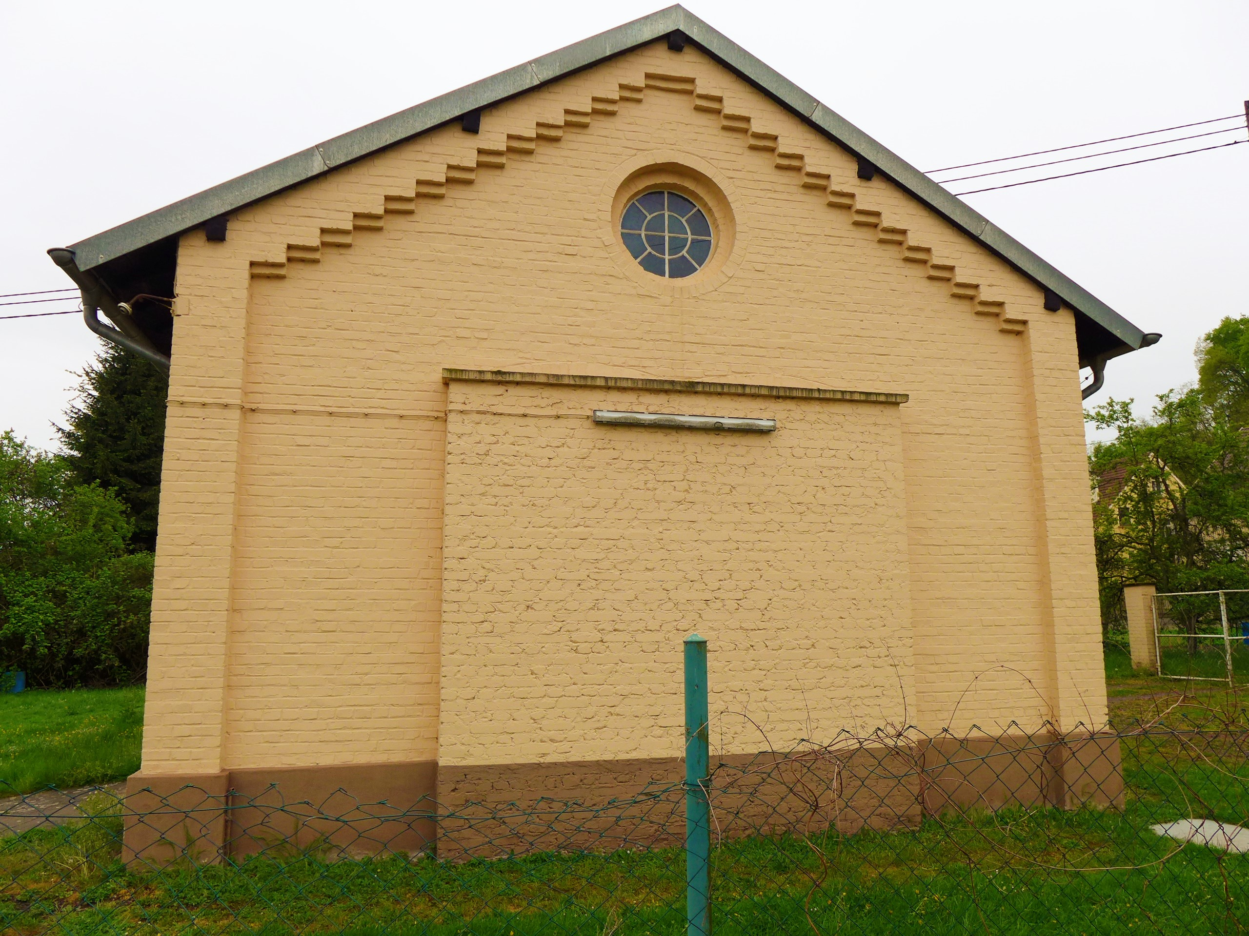 Diefflen, Pumpenhaus der Dillinger Hütte auf dem Gelände der Hüttenkolonie, Flur 8